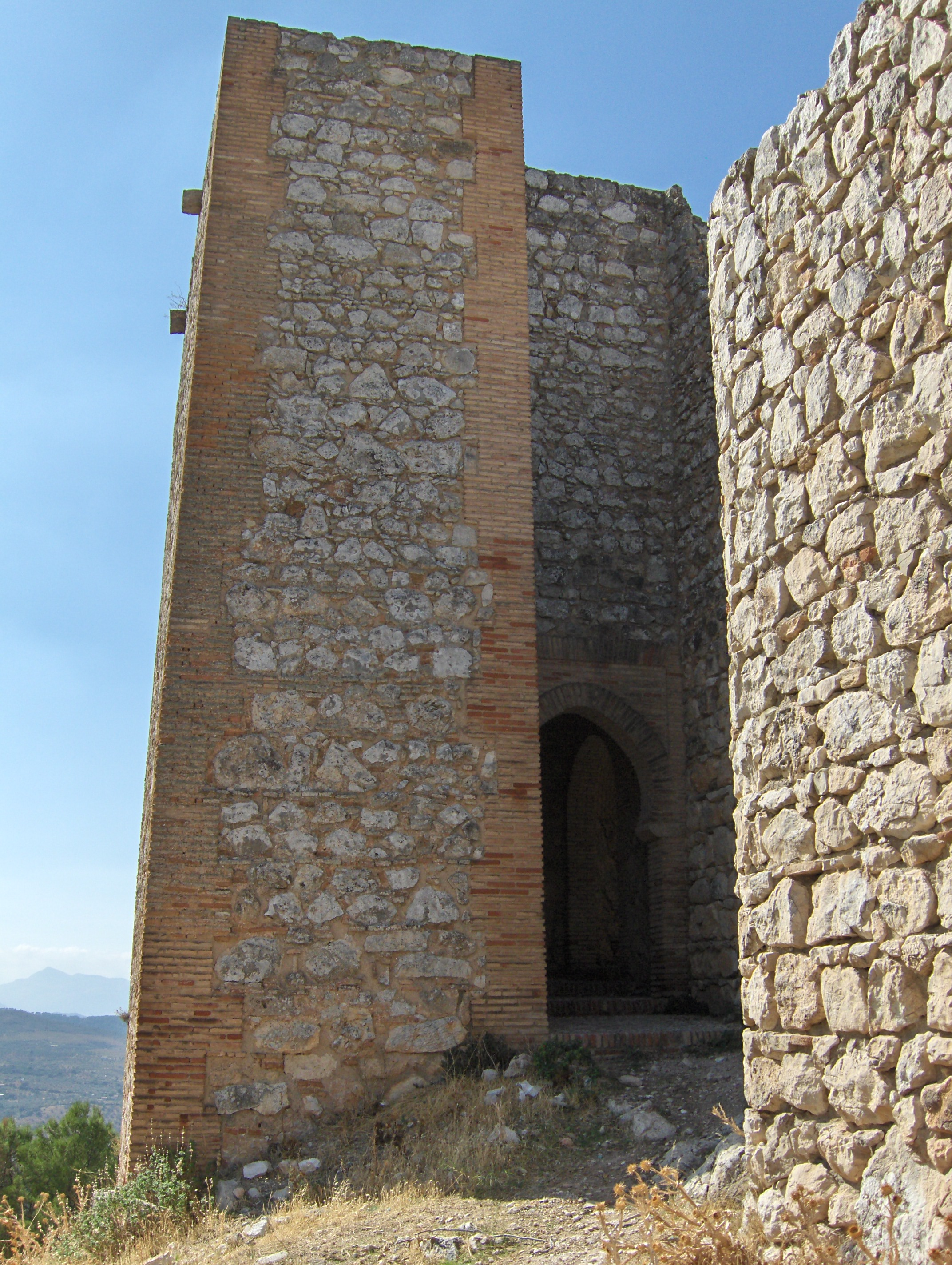 Restos de la muralla defensiva de Archidona, España.